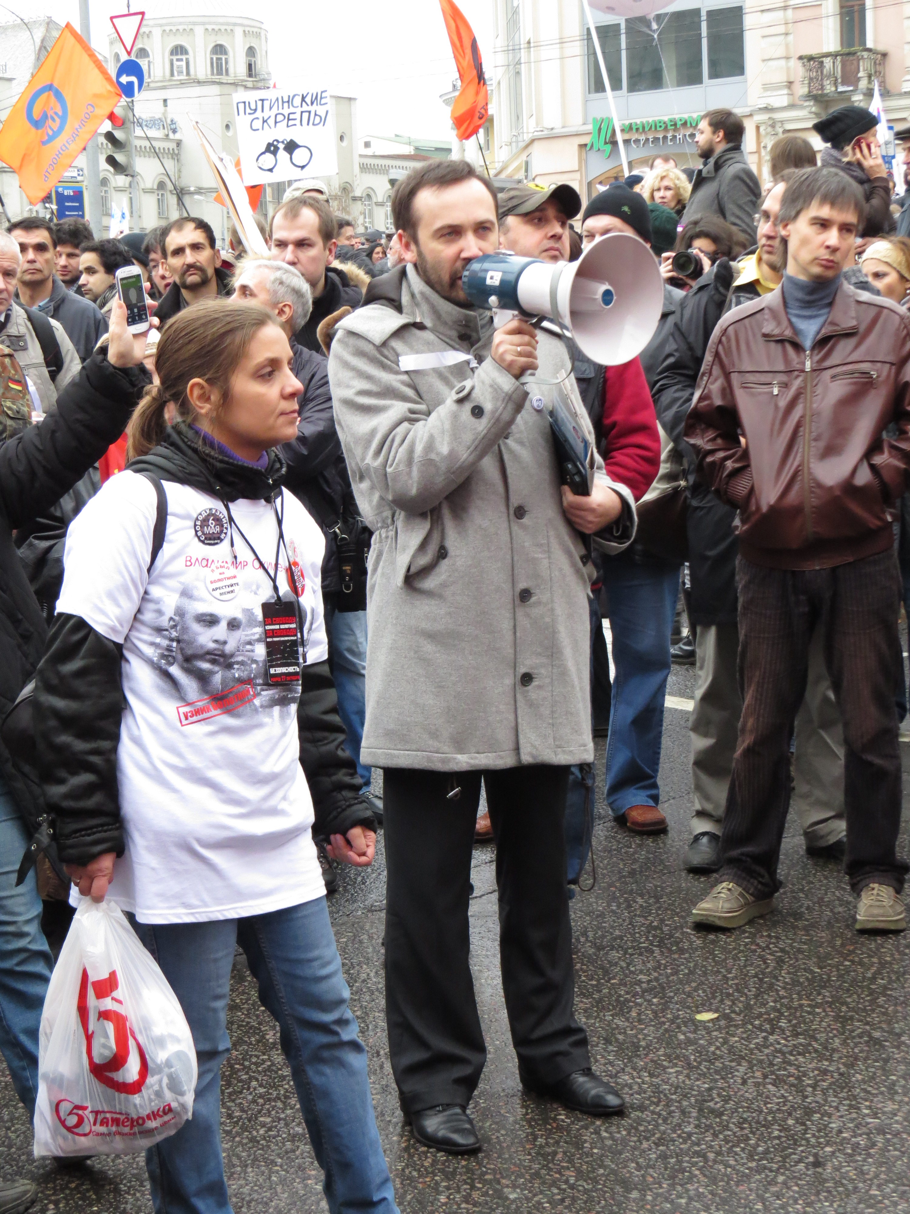 Митинг в поддержку политзаключённых 27 октября 2013 года в Москве